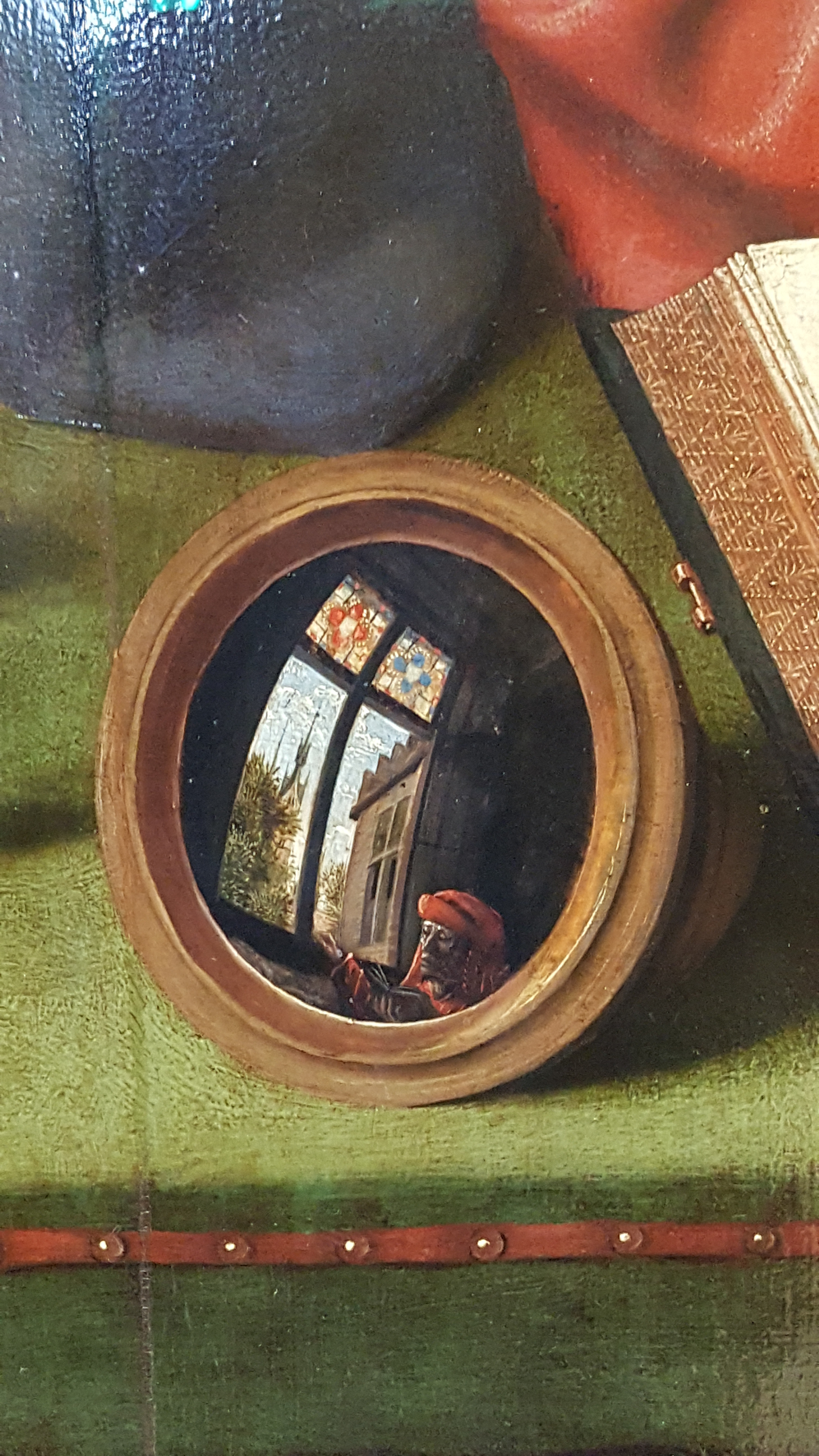 Messyn Bankier z żona (fragment)